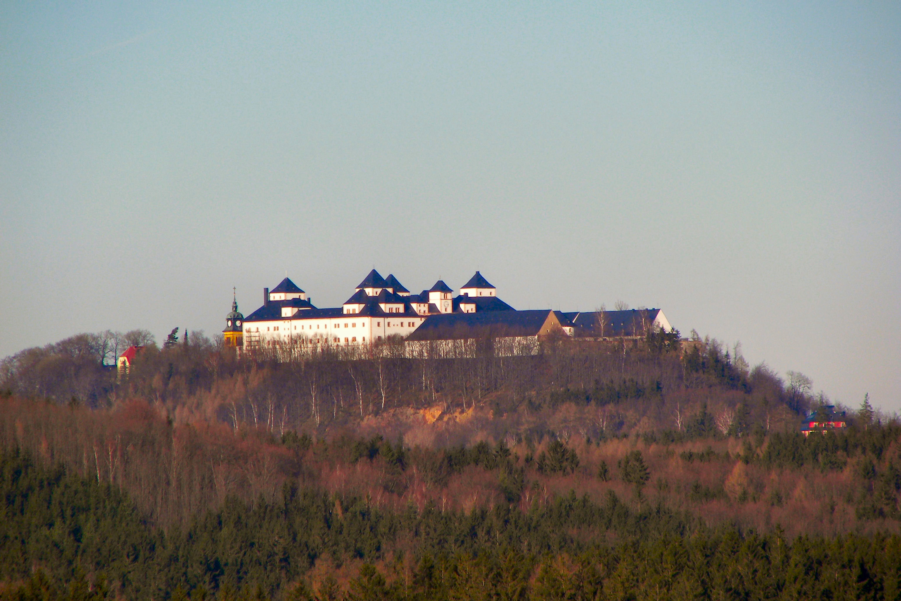 Augustusburg aus SSW